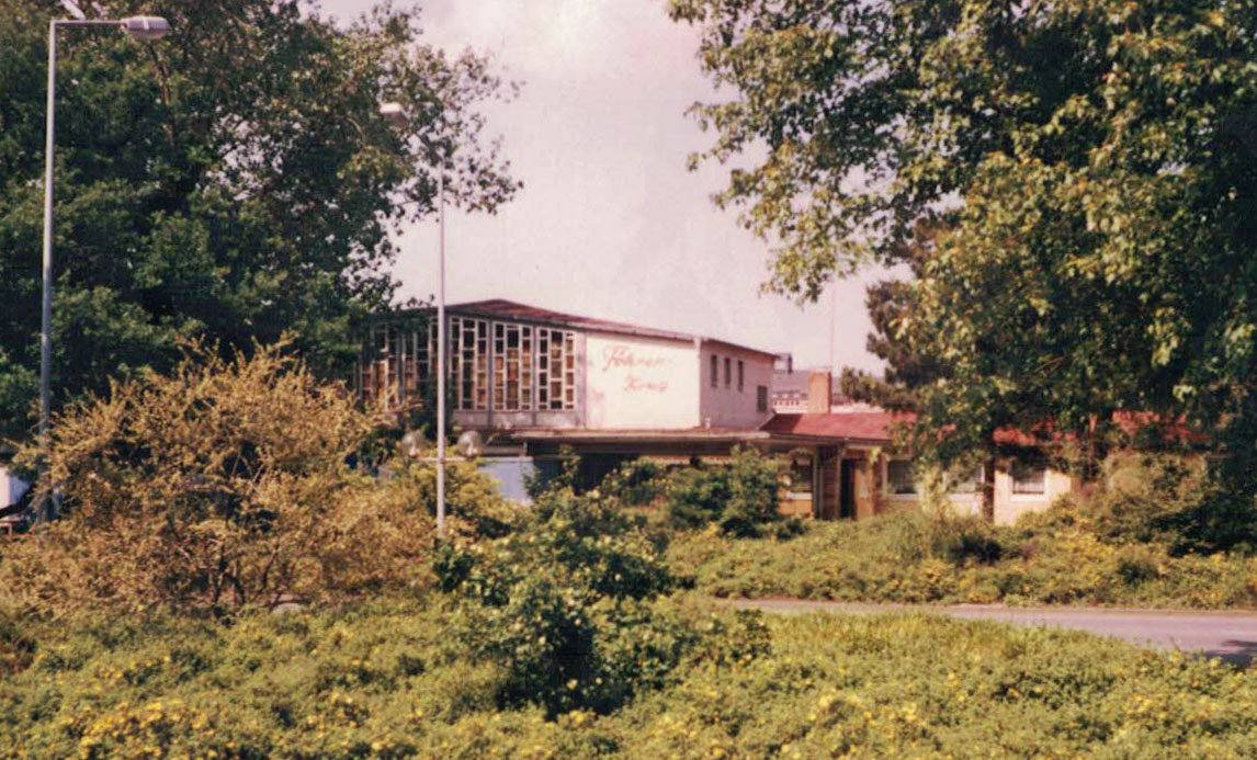 Föhrenkrug in Wolfsburg, alter Saalbau von 1957 zu Beginn der Abrissarbeiten 1984.